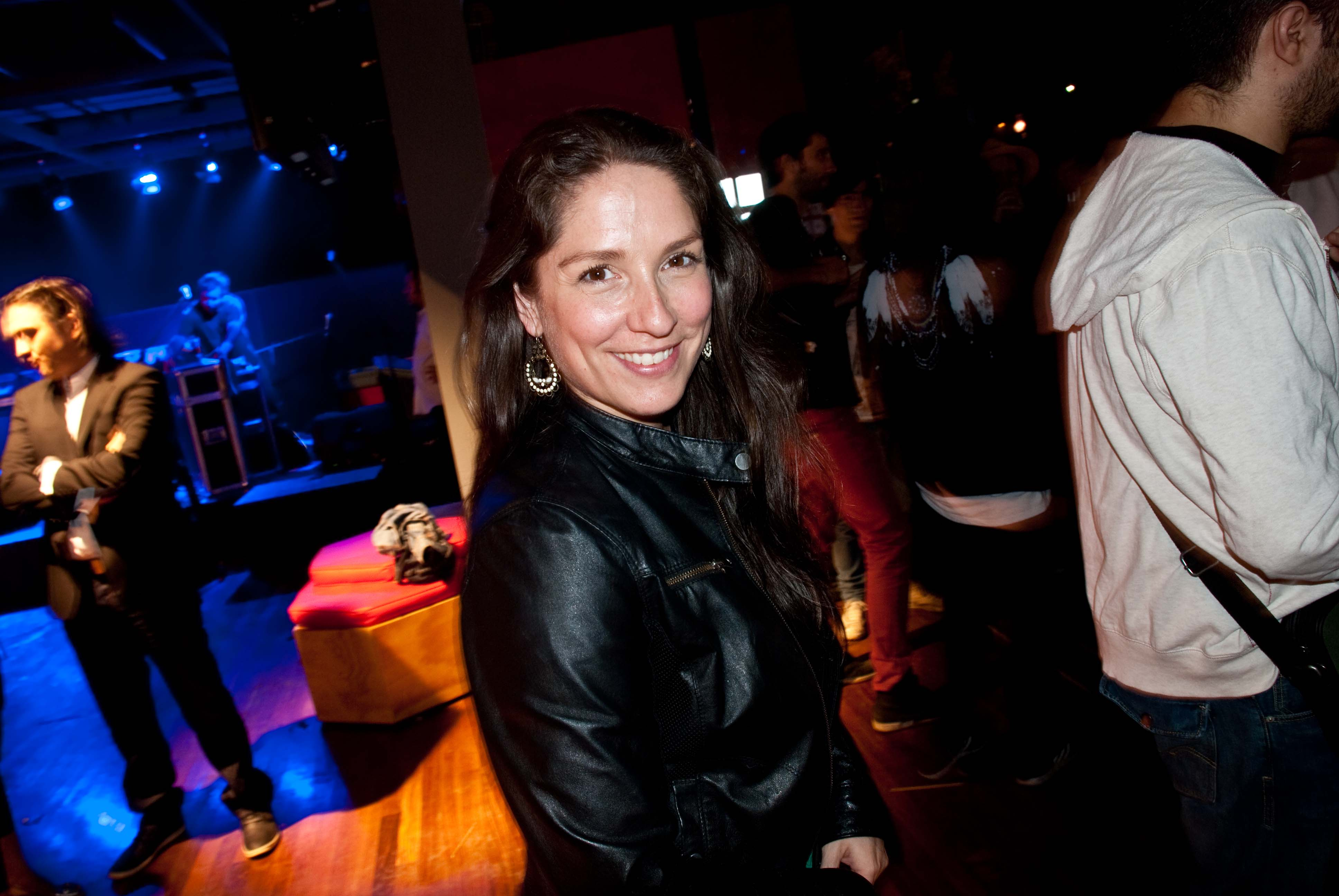 Mariana Loyola en el lanzamiento de Puma Lab, 15 de diciembre de 2011.